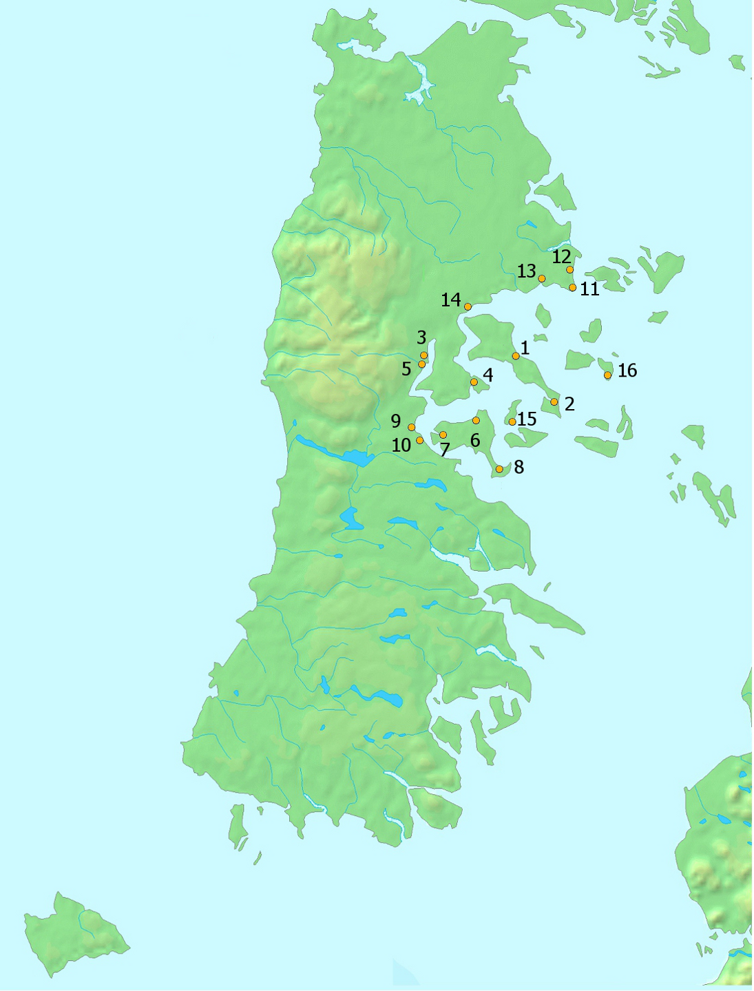 Mapa con los sitios en que se encuentran las iglesias de Chiloé declaradas Patrimonio de la Humanidad por la Unesco.